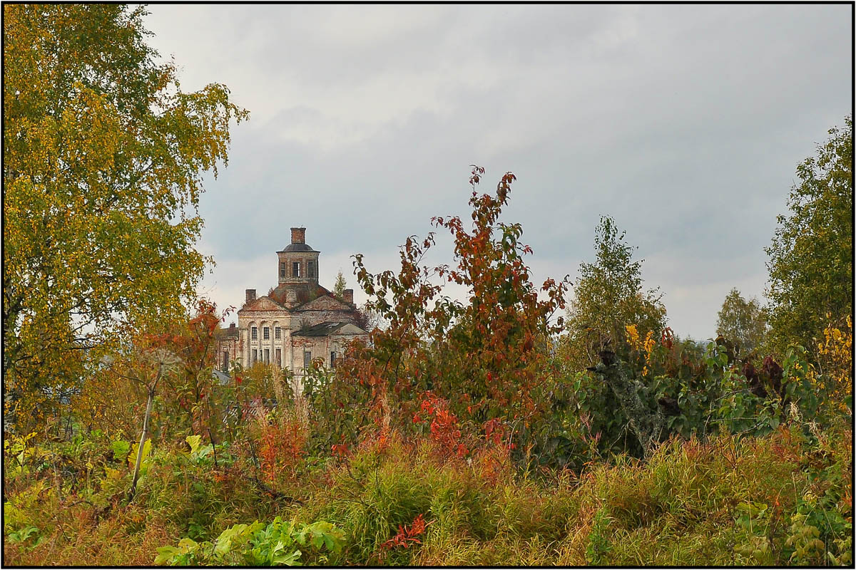 село Вотча, церковь "во имя Рождества Пресвятой Богородицы" (Стефана Пермского)